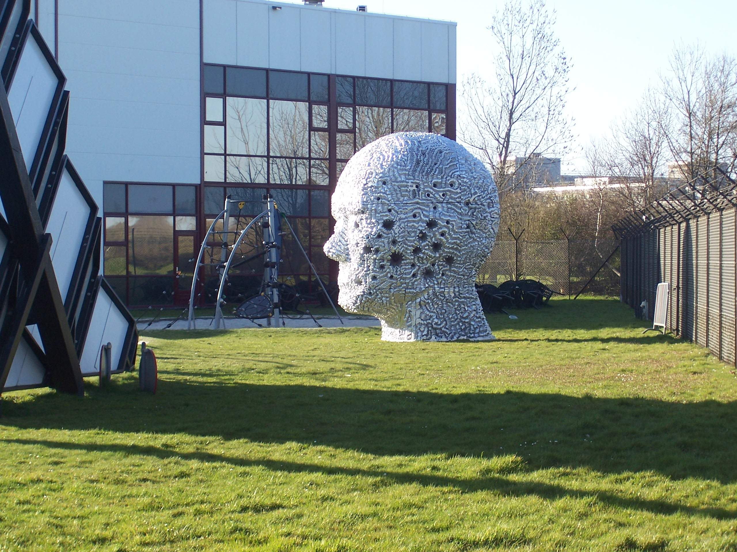 Kunstwerk van gebrand piepschuim. Jurriaan van Hall